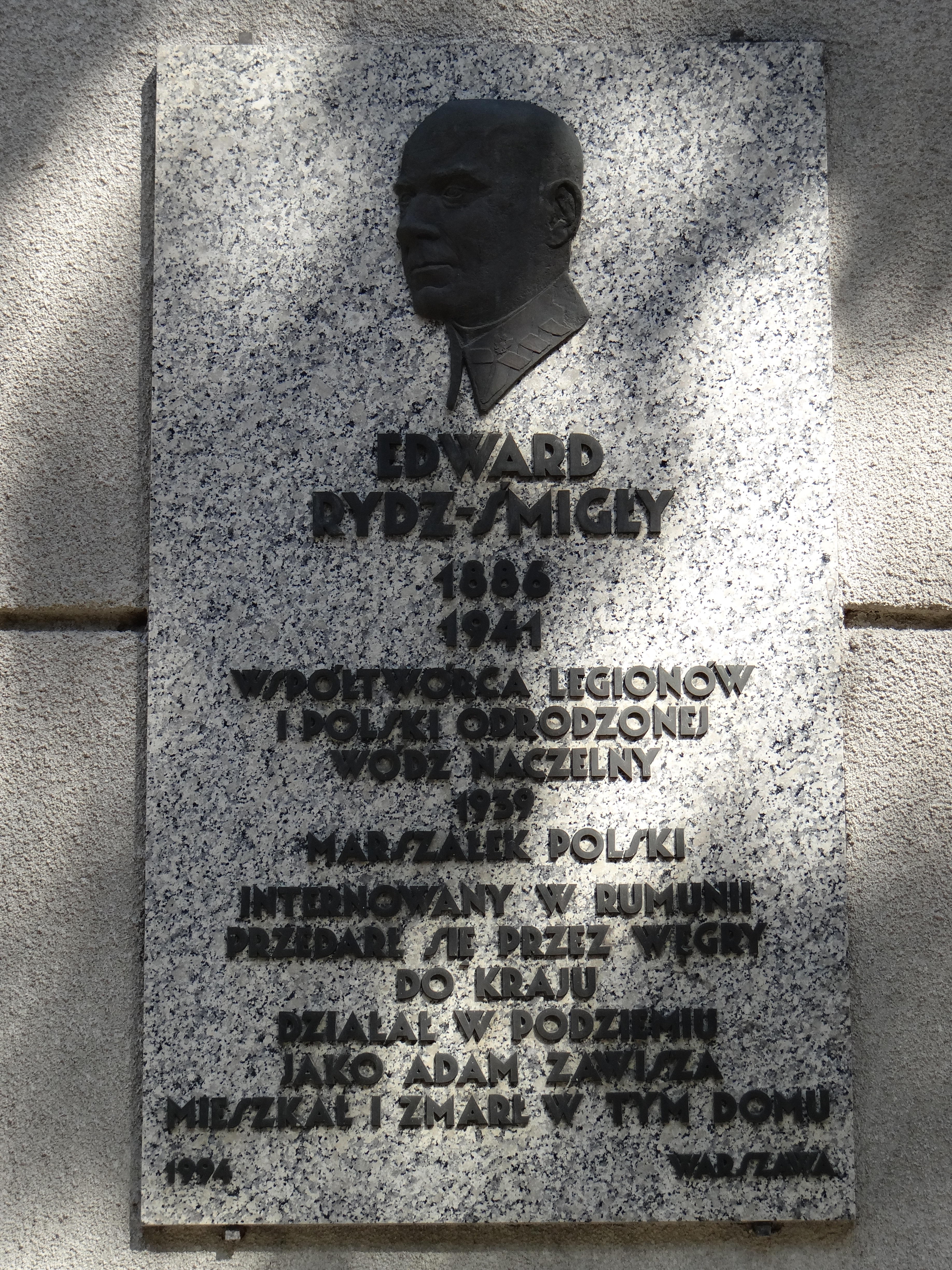 Tablica na budynku przy ulicy Sandomierskiej 18 w Warszawie upamiętnia Edwarda Rydza-Śmigłego i miejsce jego zamieszkania